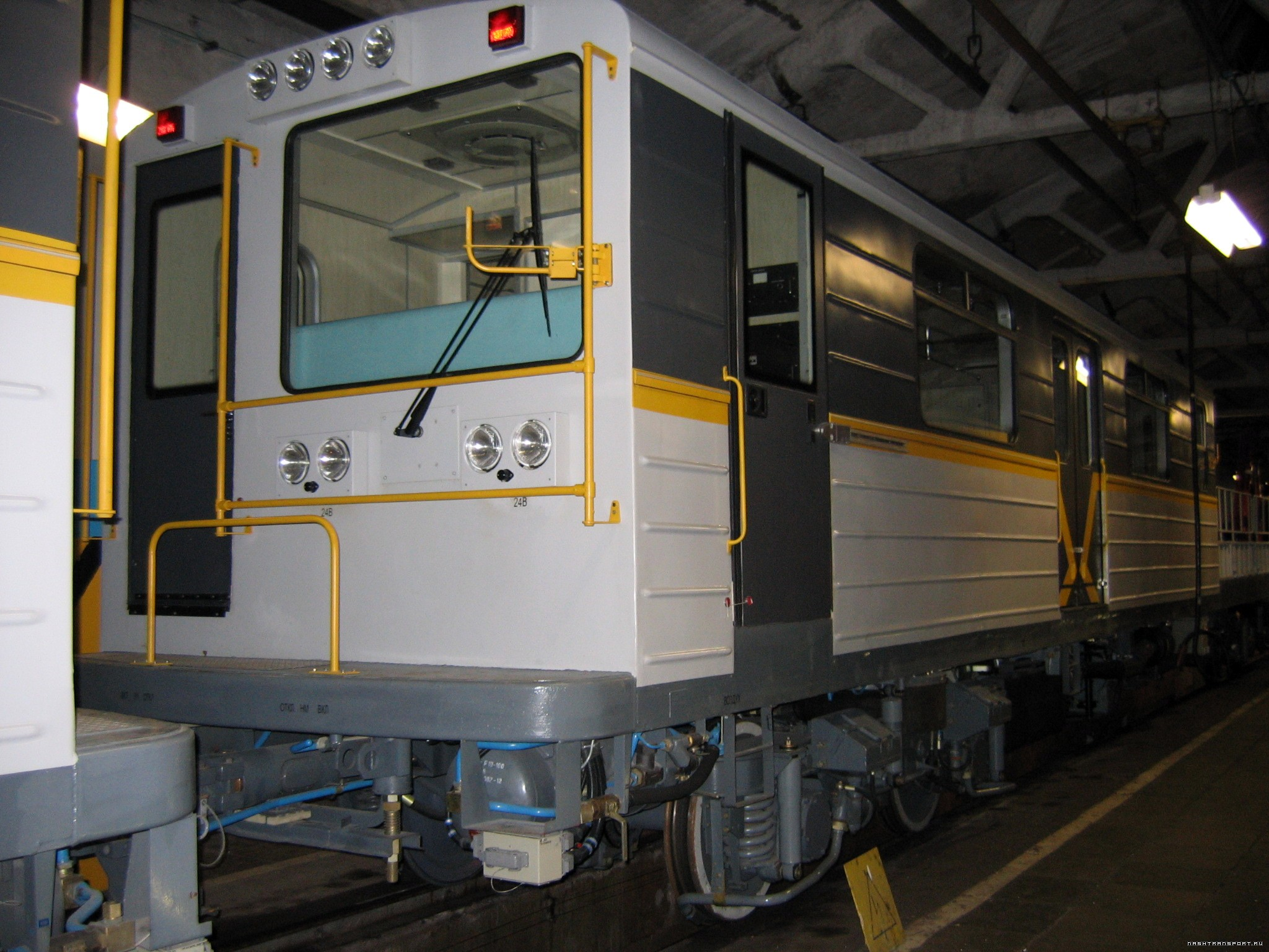 Грузопассажирская автомотриса с краном модели 81-730.05. Построена в 2008 году для линии Д6 (метро-2)